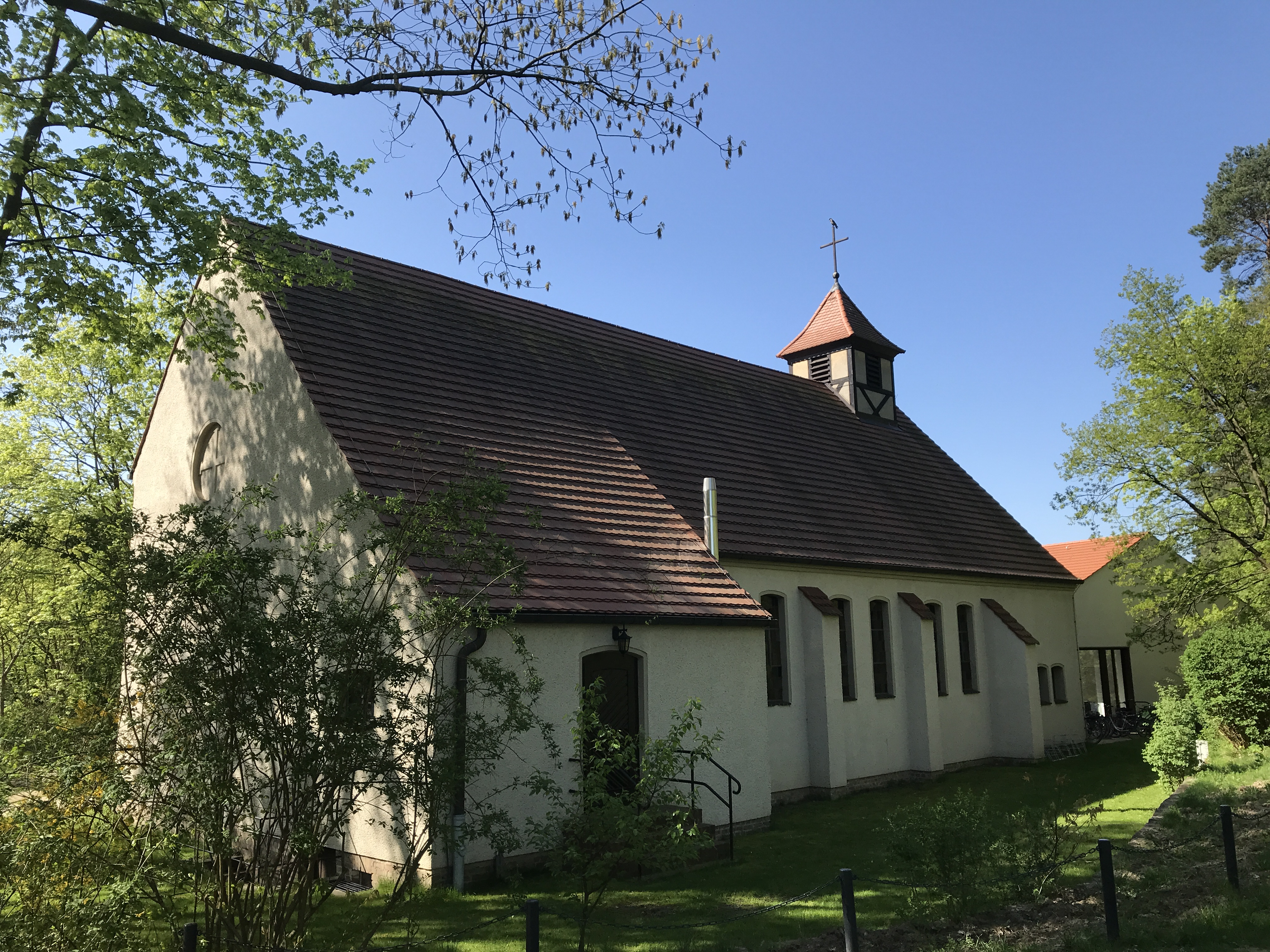 Die Michaeliskirche in Ludwigsfelde entstand in den Jahren 1953 bis 1955 nach einem Entwurf des Kirchenbaurates Winfried Wendland.